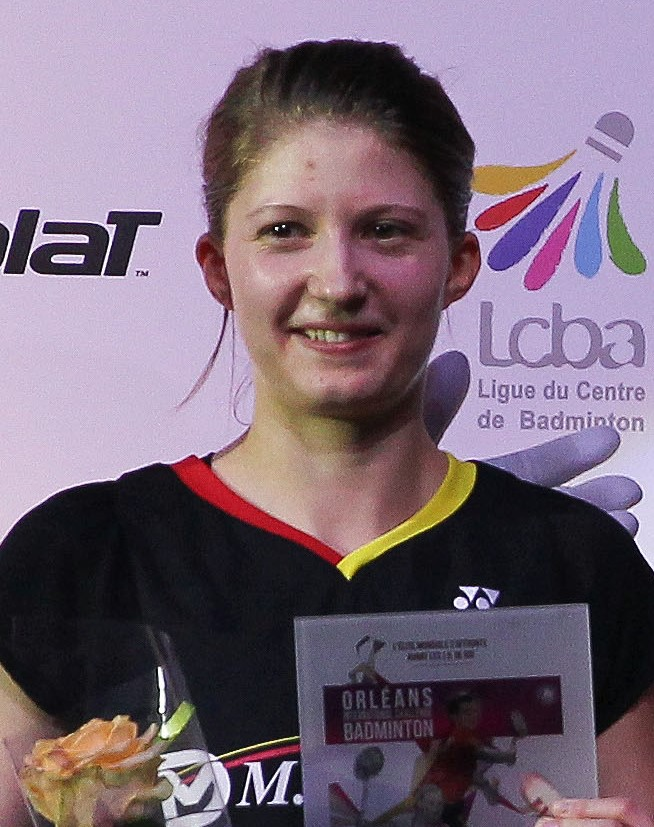 Lena Grebak le 3 avril 2016.